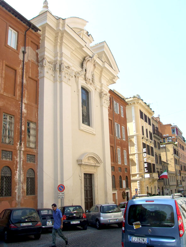 Gesù Bambino, Chiesa a Roma, Facciata rinnovata